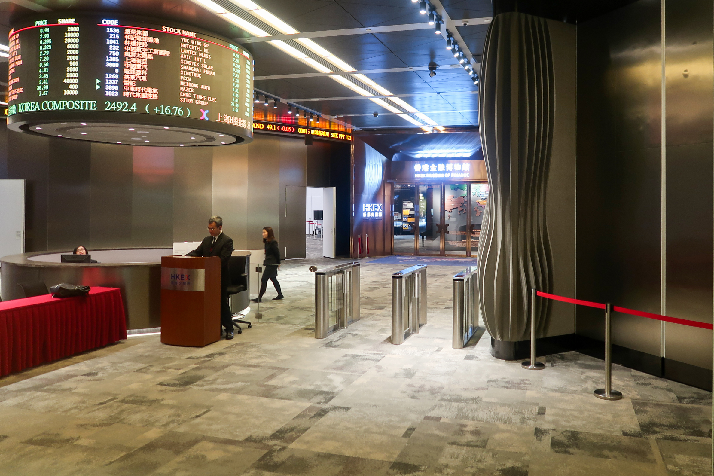 HKEX CONNECT HALL 香港金融大會堂